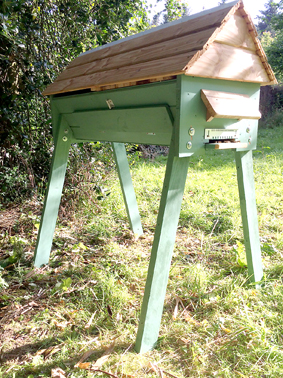 Ruche horizontale installée dans un jardin